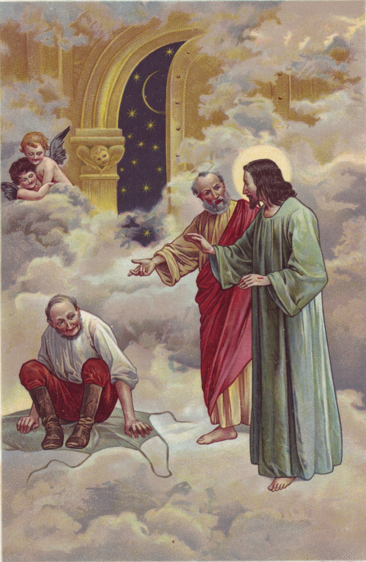 Ilustrace Věnceslava Černého (1865-1936) k pohádce Švec a čert z knihy K. J. Erbena (1811-1870) Báje a pověsti slovanské. Kniha bez vročení, ale předslov napsán v roce 1901 (jediné uvedené datum v knize). Dle katalogu nkp.cz vydáno v roce 1902.